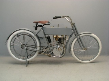 Timeless 440 cc motorcycle